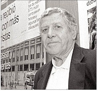 Francisco Rinaldi, actor y director teatral